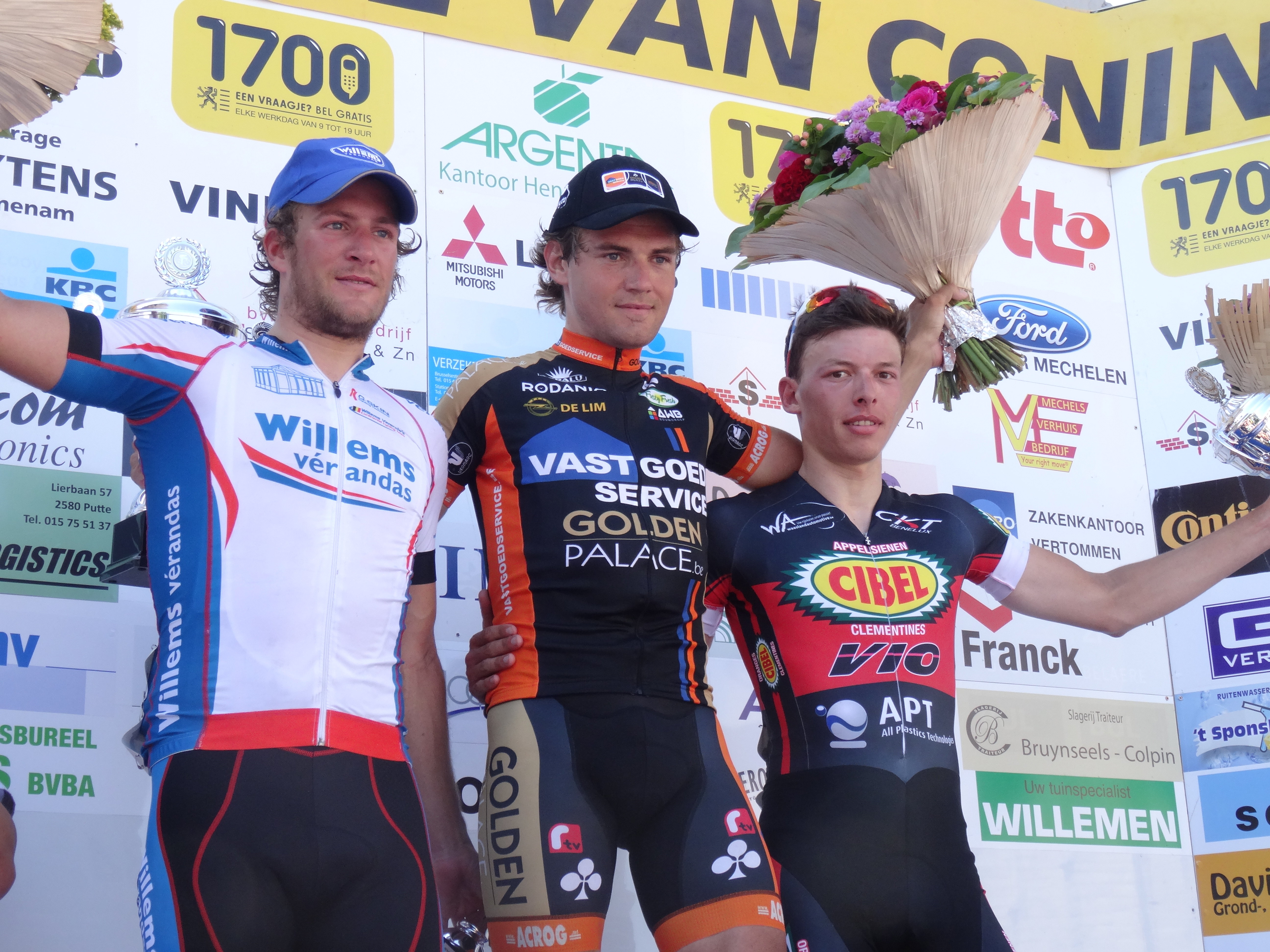 Reportage photographique réalisé le dimanche 8 juin à l'occasion de l'arrivée du Mémorial Philippe Van Coningsloo 2014 à Bonheiden, Belgique.